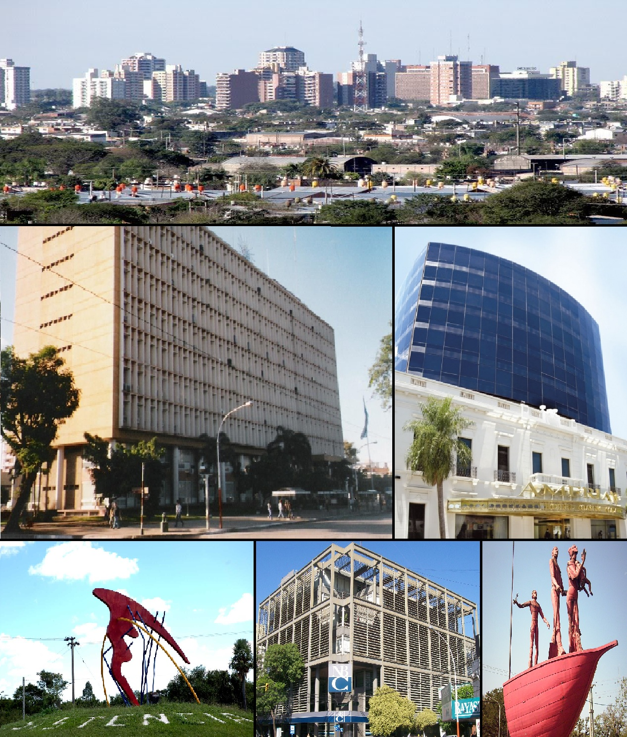 Añadí imágenes nuevas del skyline entre otras cosas, creo que este montage queda mejor